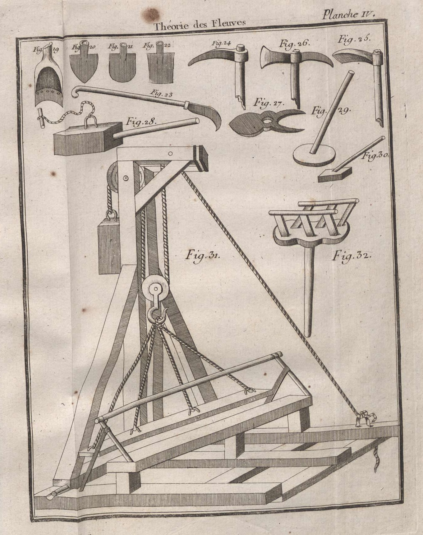 Battipalo. Tratto da Abhandlung vom Wasserbau an Strömen